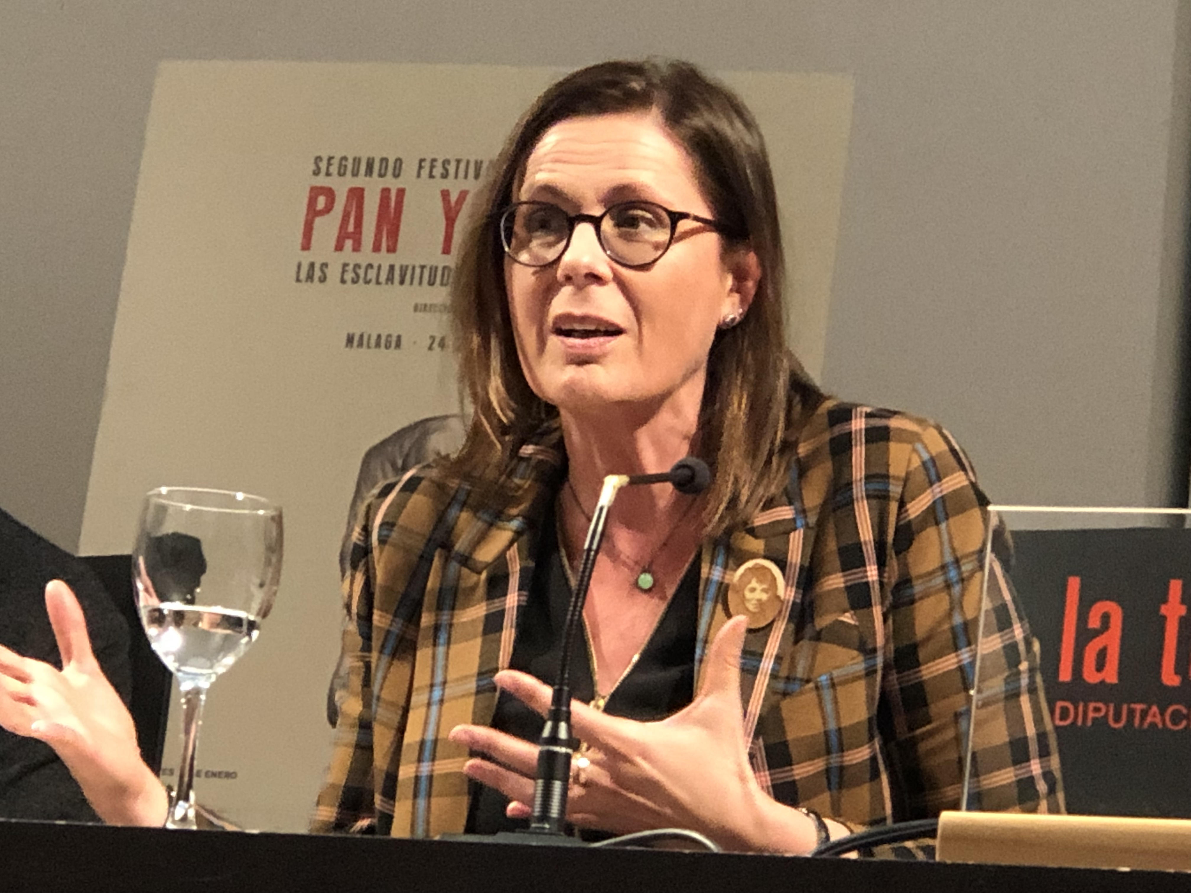 II Festival de Filosofía de Filosofía de Malaga